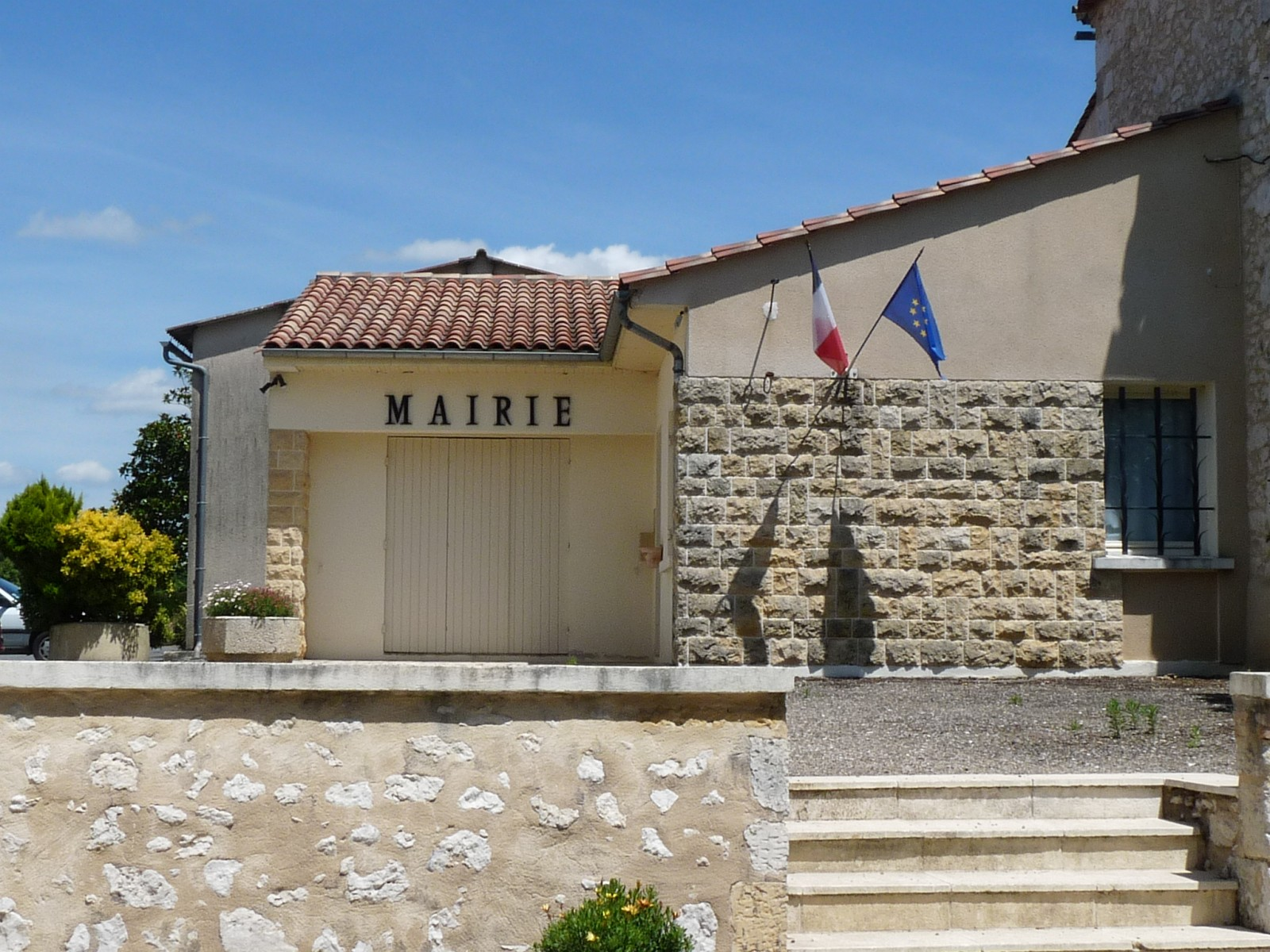 Mairie de Riocaud, Gironde, France